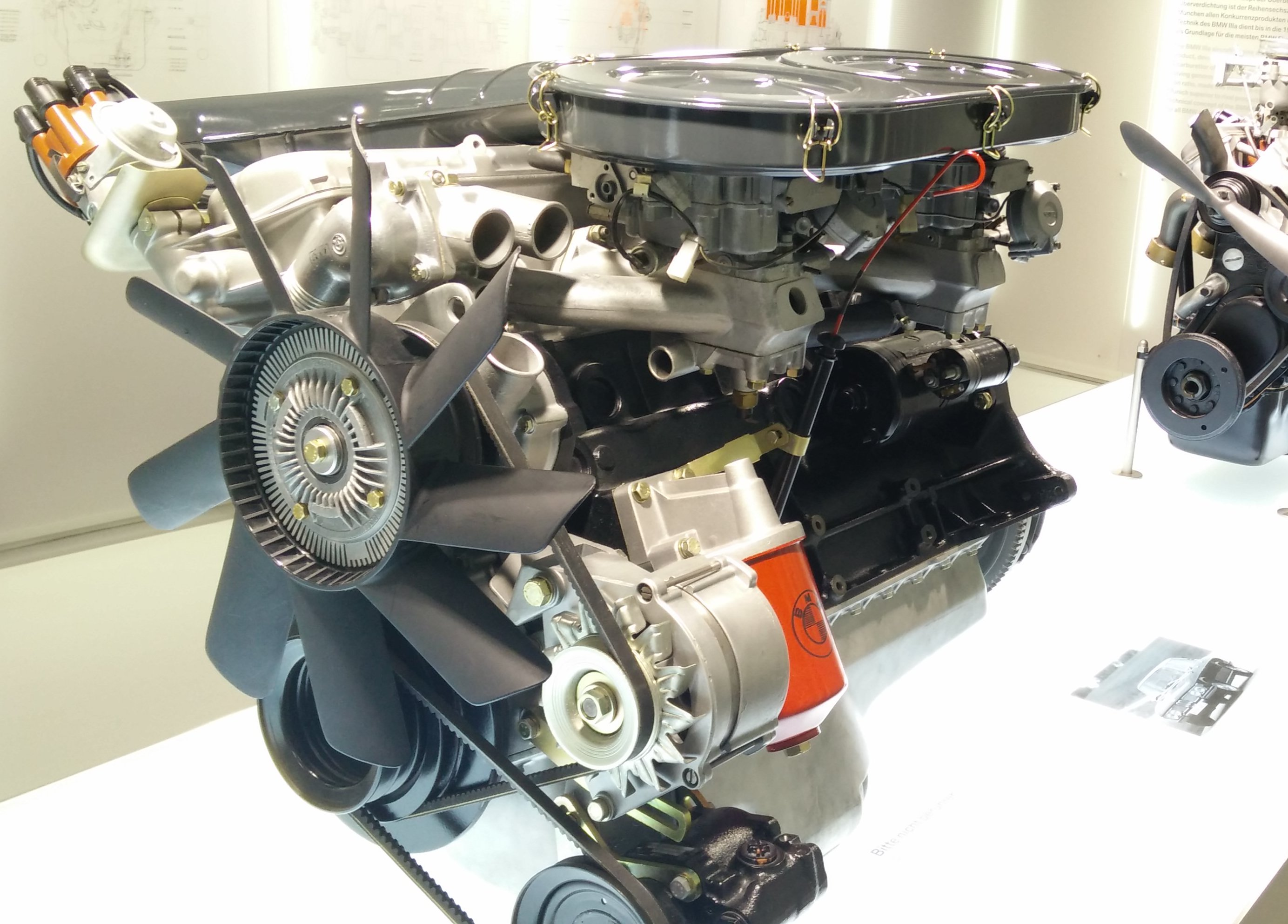 IMG_20141113_112632